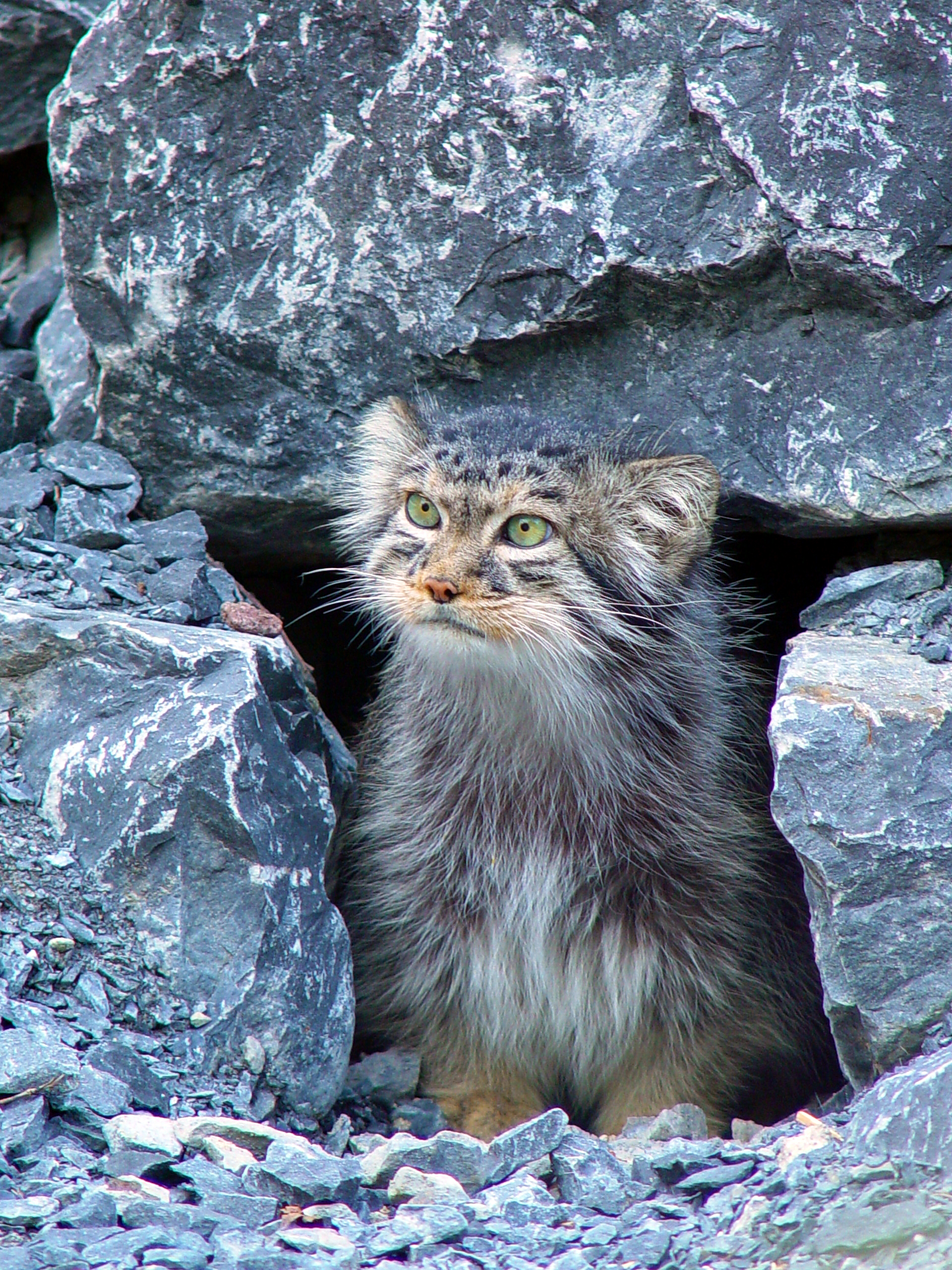 Manul (Otocolobus manul) in Zoo Zürich